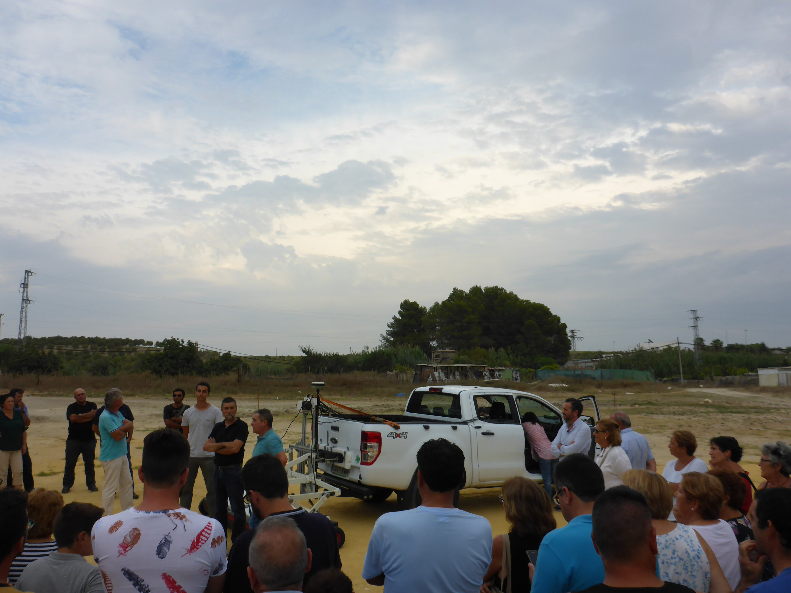 Mesas de Asta, Jerez de la Frontera (España). Presentación de resultados del proyecto de arqueológico desarrollador por la Universidad de Cádiz en el yacimiento de Asta Regia.